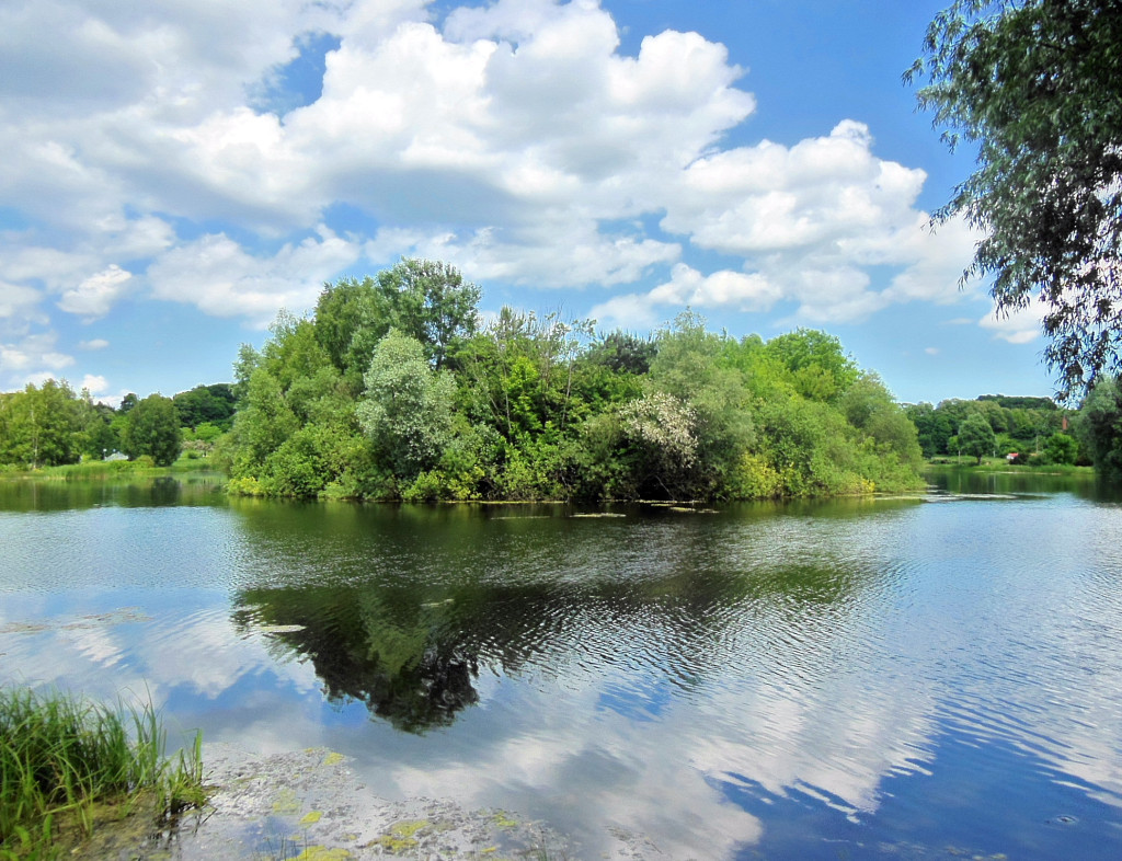 Ptasia wyspa na stawie parkowym w Leśnym Parku Kultury i Wypoczynku "Myślęcinek" w Bydgoszczy